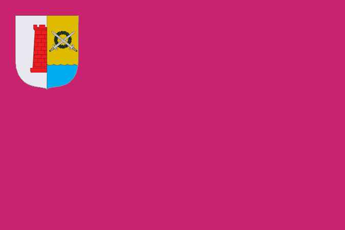 Прапор Корсунь-Шевченківського району